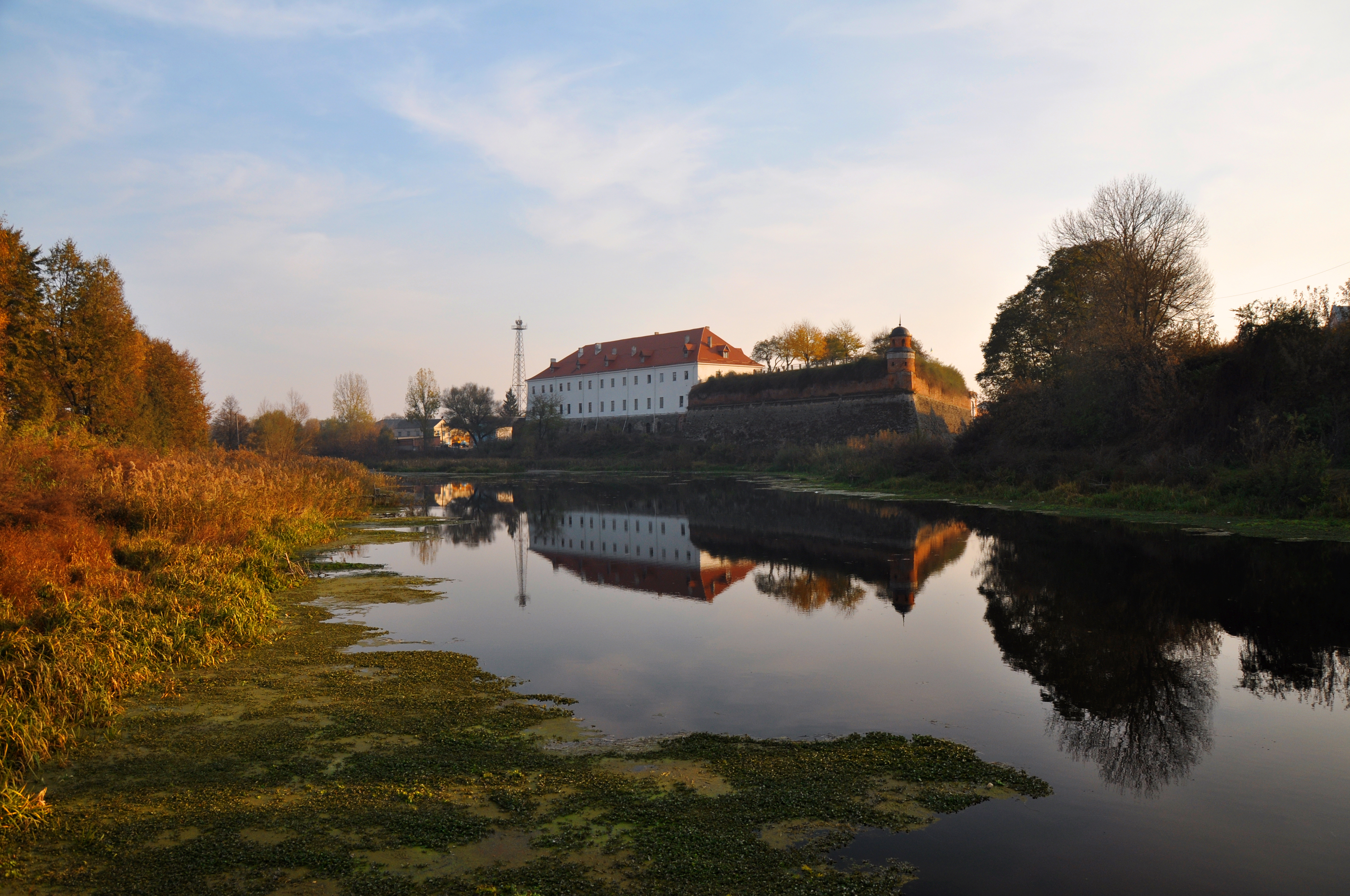 Замок князів Острозьких-Любомирських (мур.), Дубно, вул. Шевченка